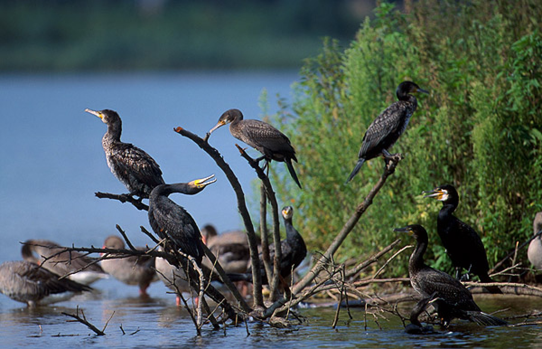 Zalew-kormorany